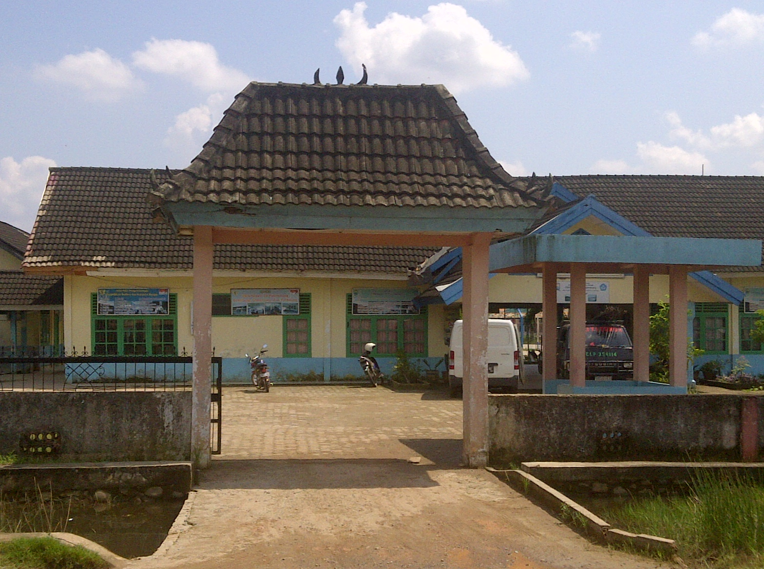 Gerbang utama SMA Negeri 19 Palembang